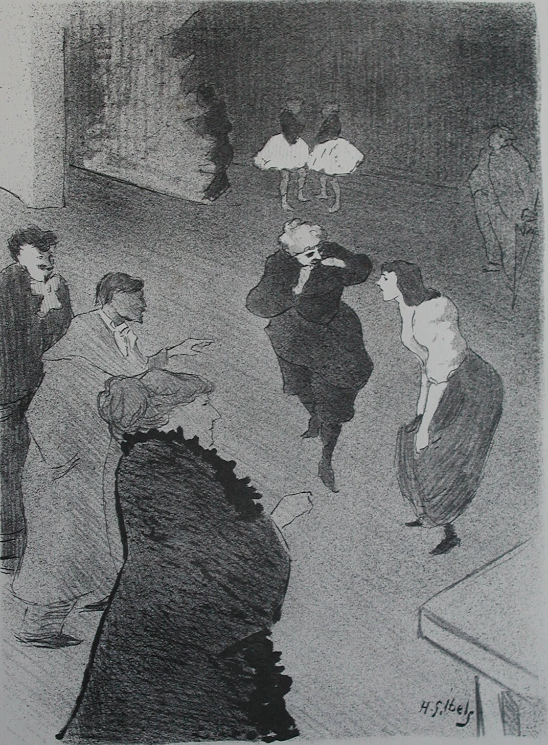 Répétition aux Folies-Bergère. Lithographie de Henri-Gabriel Ibels (1867-1936)